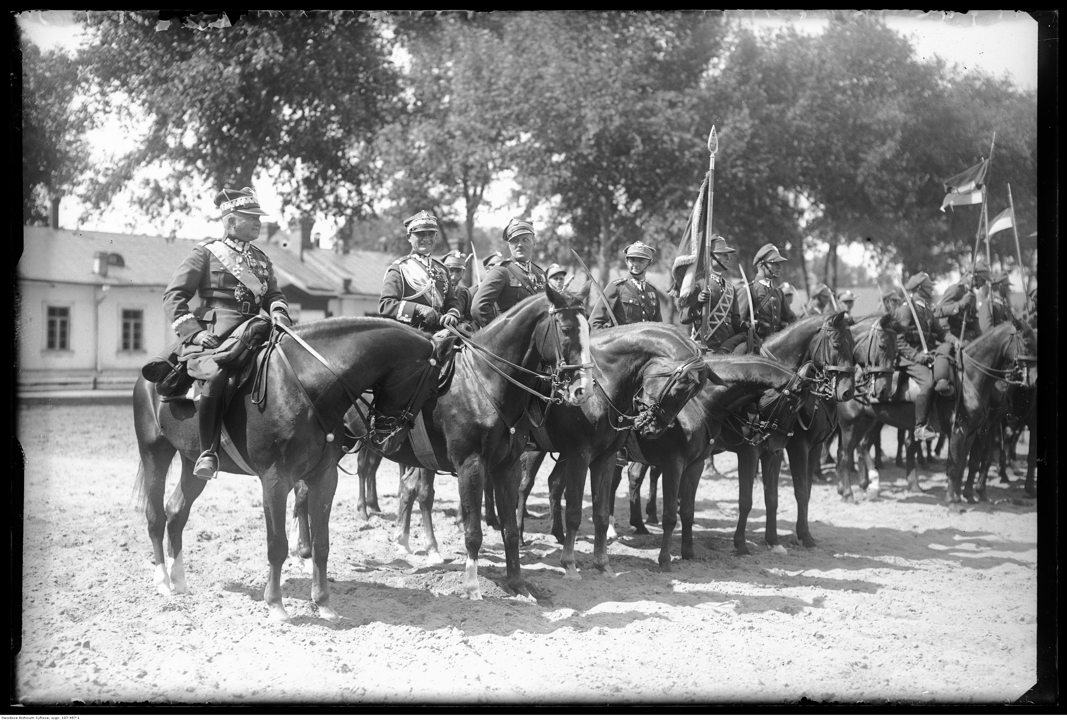 Byli dowódcy 1 Pułku Ułanów Krechowieckich im. Pułkownika Bolesława Mościckiego.Pierwszy z lewej: gen. dyw. Stefan Suszyński